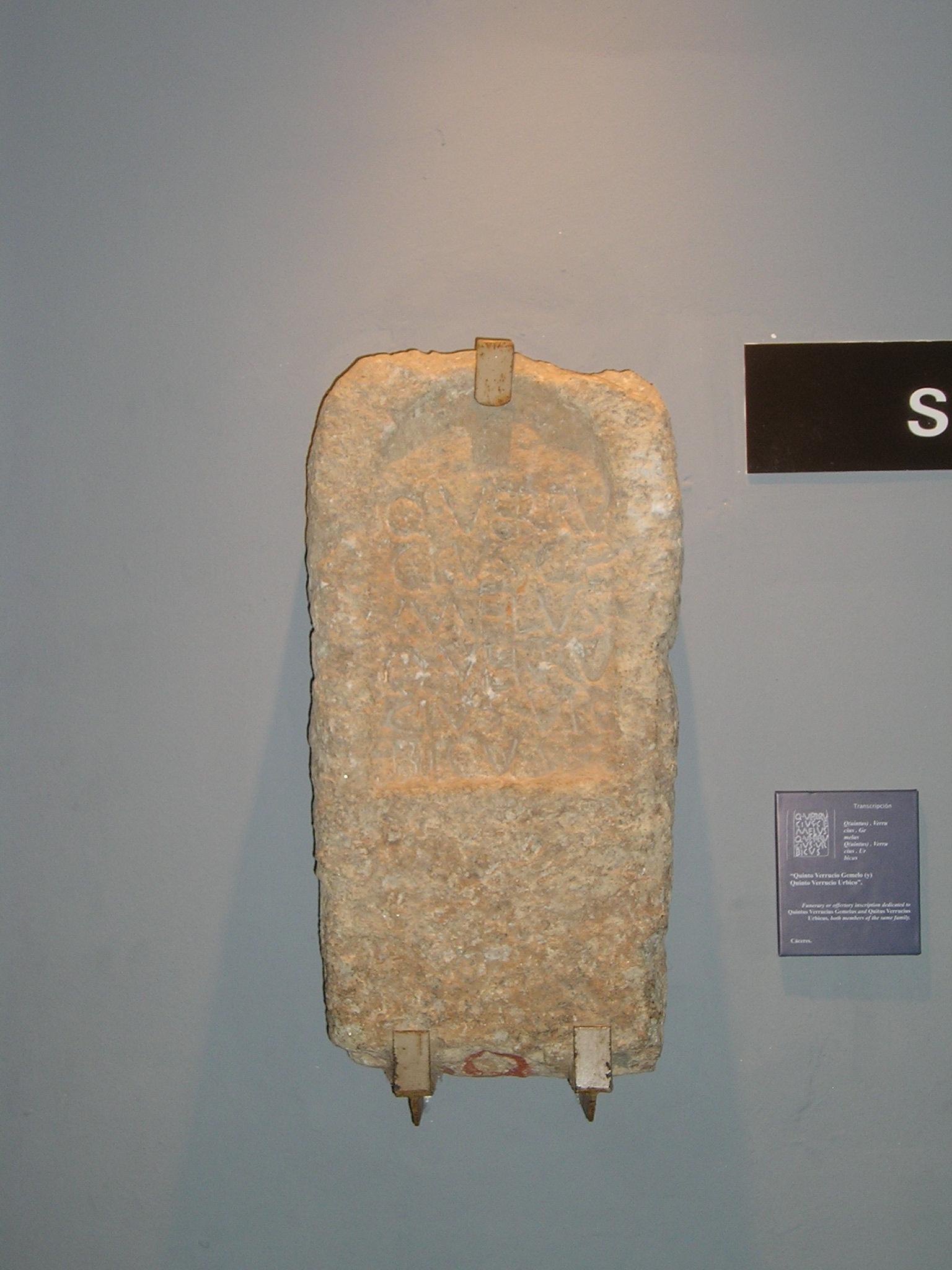 Inscripción funeraria AE 1971, 155 procedente del palacio de Ovando en Cáceres, depositada en el Museo de Cáceres, cuyo texto reza: Q(uintus)· VERRV/CIVS·GE/MELVS/ Q(uintus)· VERRV/CIVS· VR/BICVS